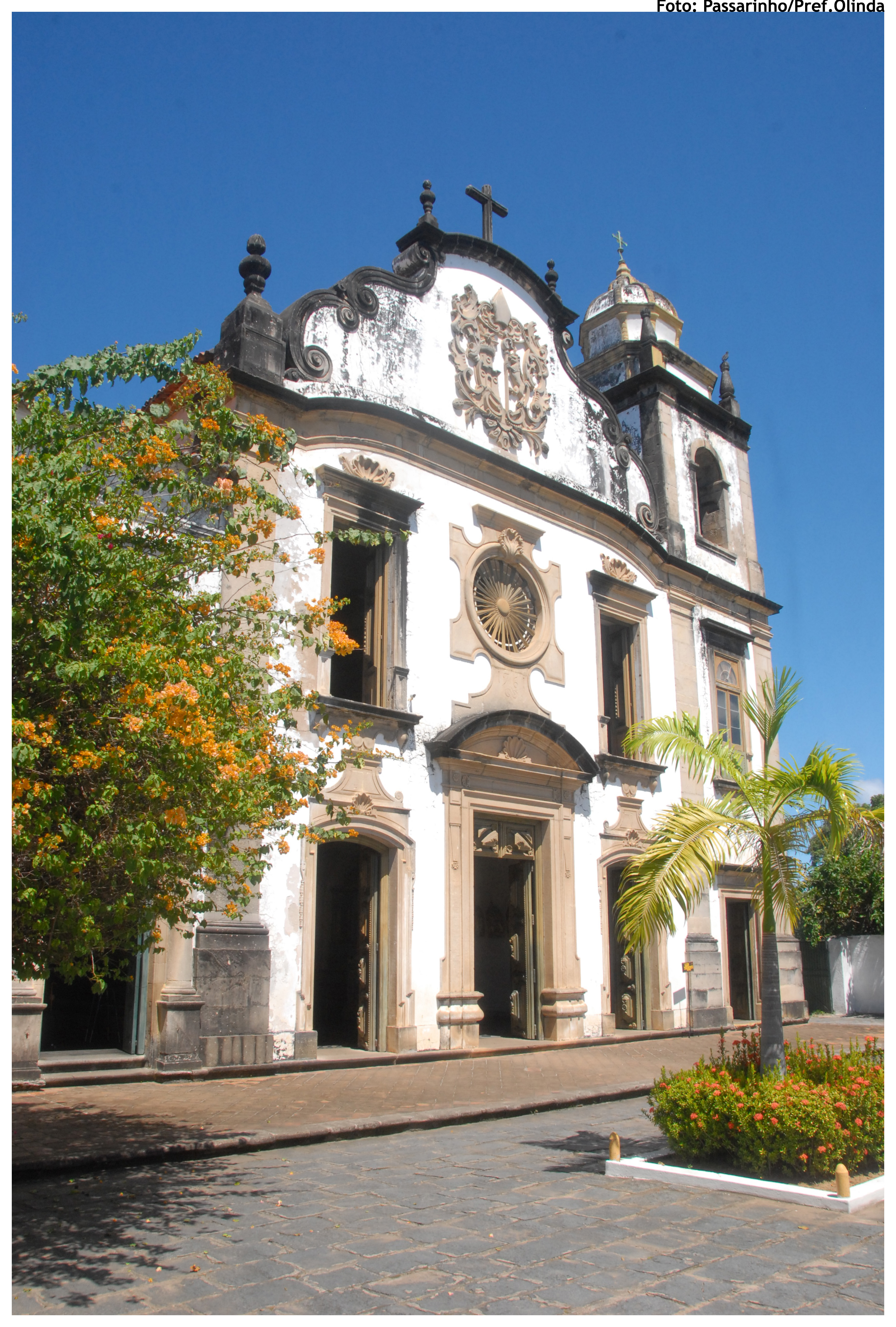 Foto: Passarinho/Pref.Olinda